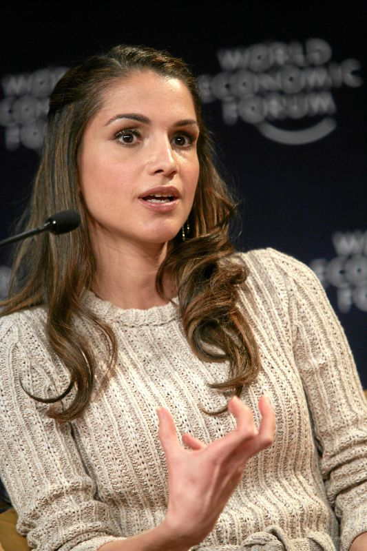 Queen Rania